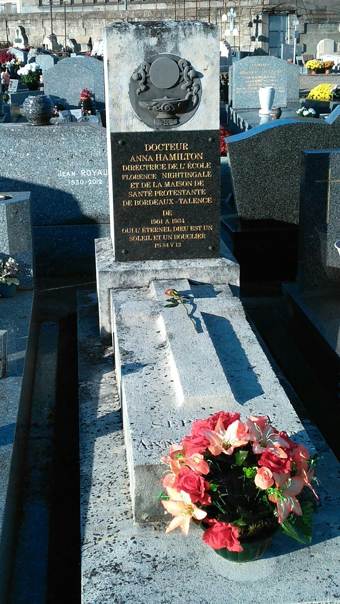 Tombe d'Anna Hamilton dans le cimetière municipal de Talence